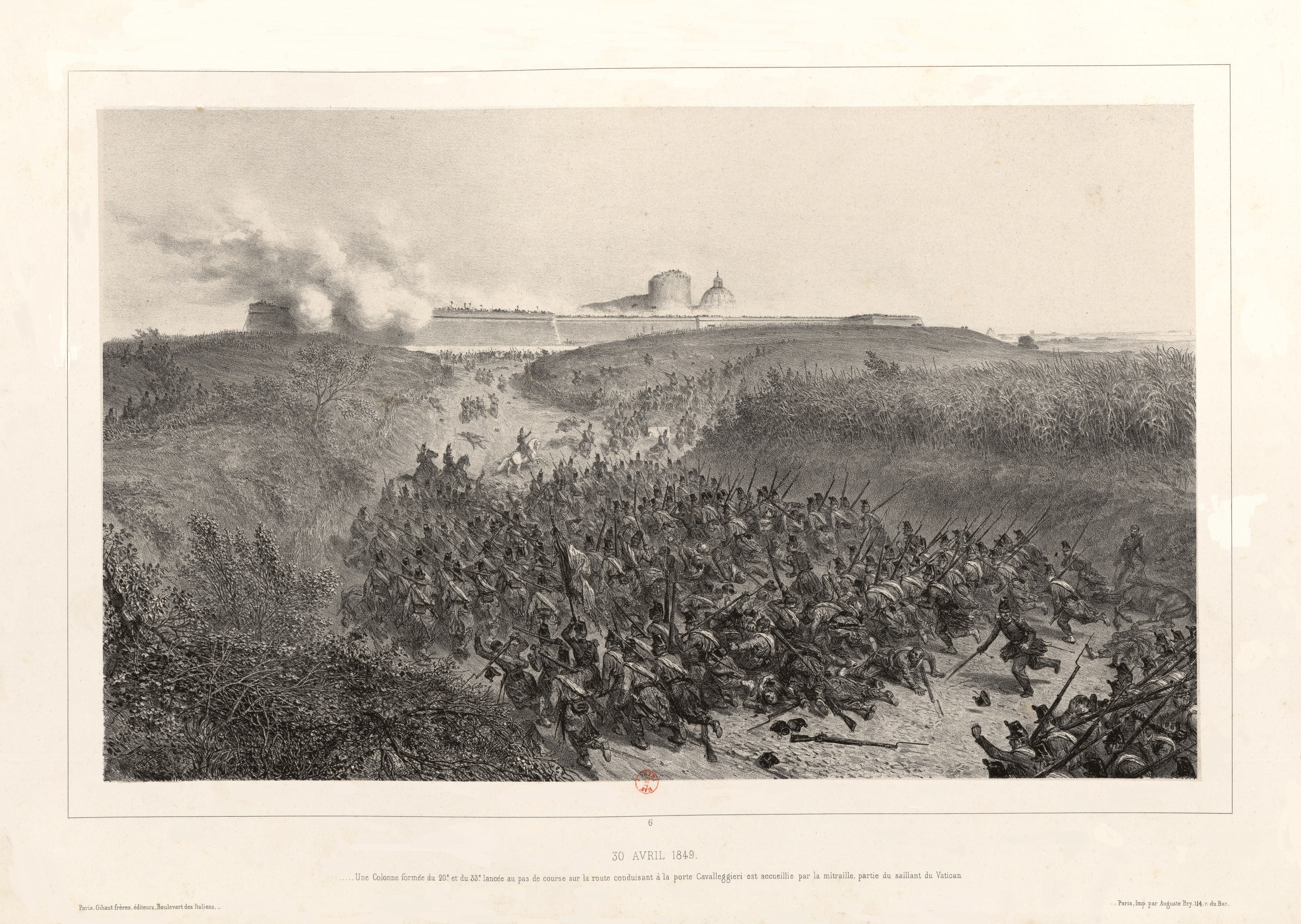 "30 avril 1849. Une colonne formée du 20.e et du 33.e lancée au pas de course sur la route conduisant à la porte Cavallegieri est accueillie par la mitraille partie du saillant du Vatican", lithographie d'Auguste Raffet, Souvenirs d'Italie. Expédition de Rome, Paris, Gilhaut, 1854.